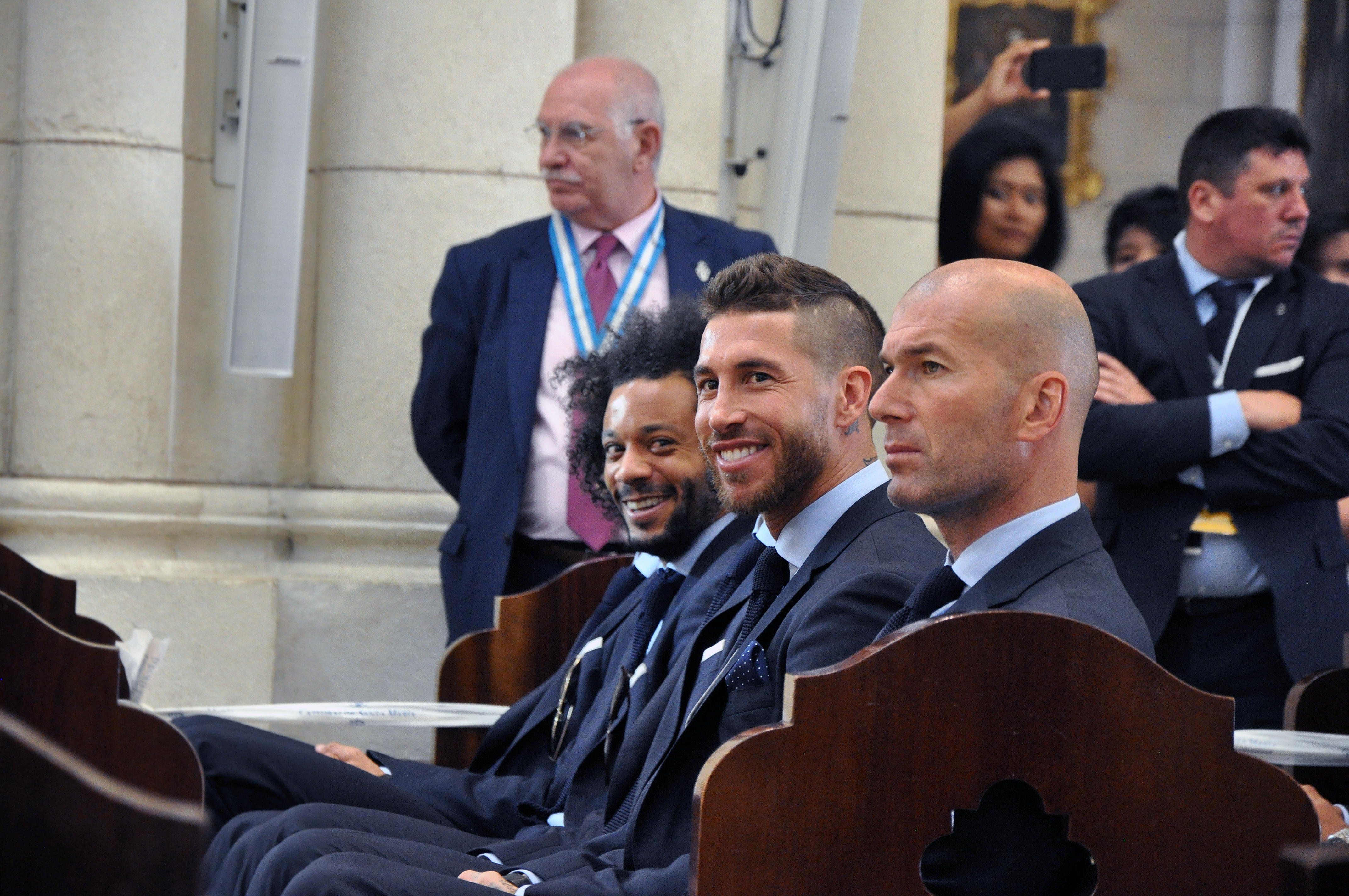 El Real Madrid ofrece la Champions a la Virgen de la Almudena. Créditos: archimadrid / José Luis Bonaño.